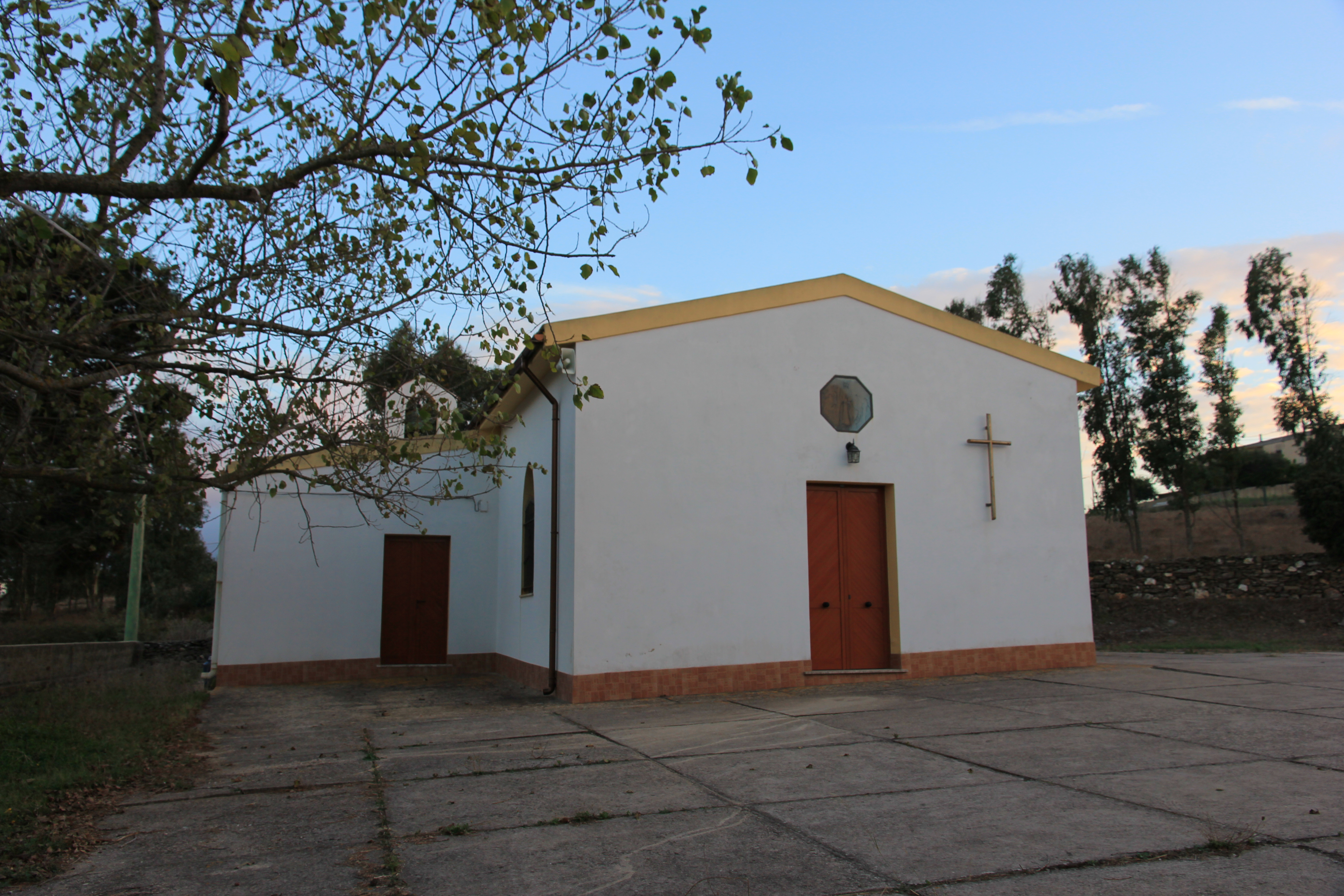 Sassari - Canaglia - Chiesa di Santa Barbara